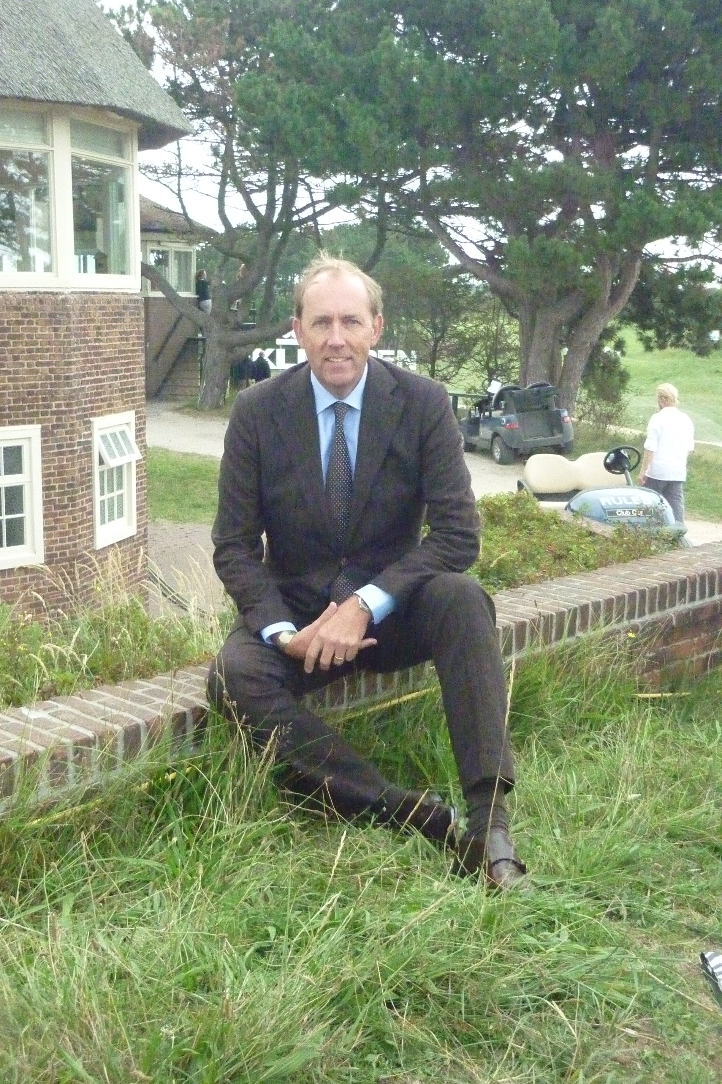 Daan Slooter op de Kennemer tijdens KLM Open 2014